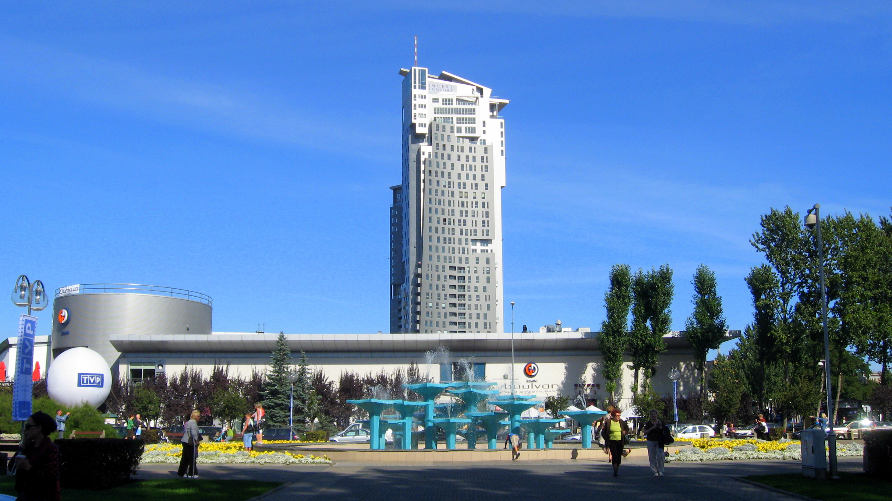 Gdynia: Fontanna na Skwerze Kościuszki (Aleja JP2), w tle budynek Sea Towers